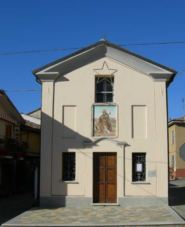 Facciata della chiesetta di San Rocco a Torrazza Coste